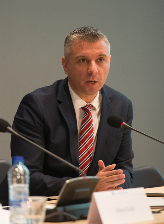 Hrvoje Klasić